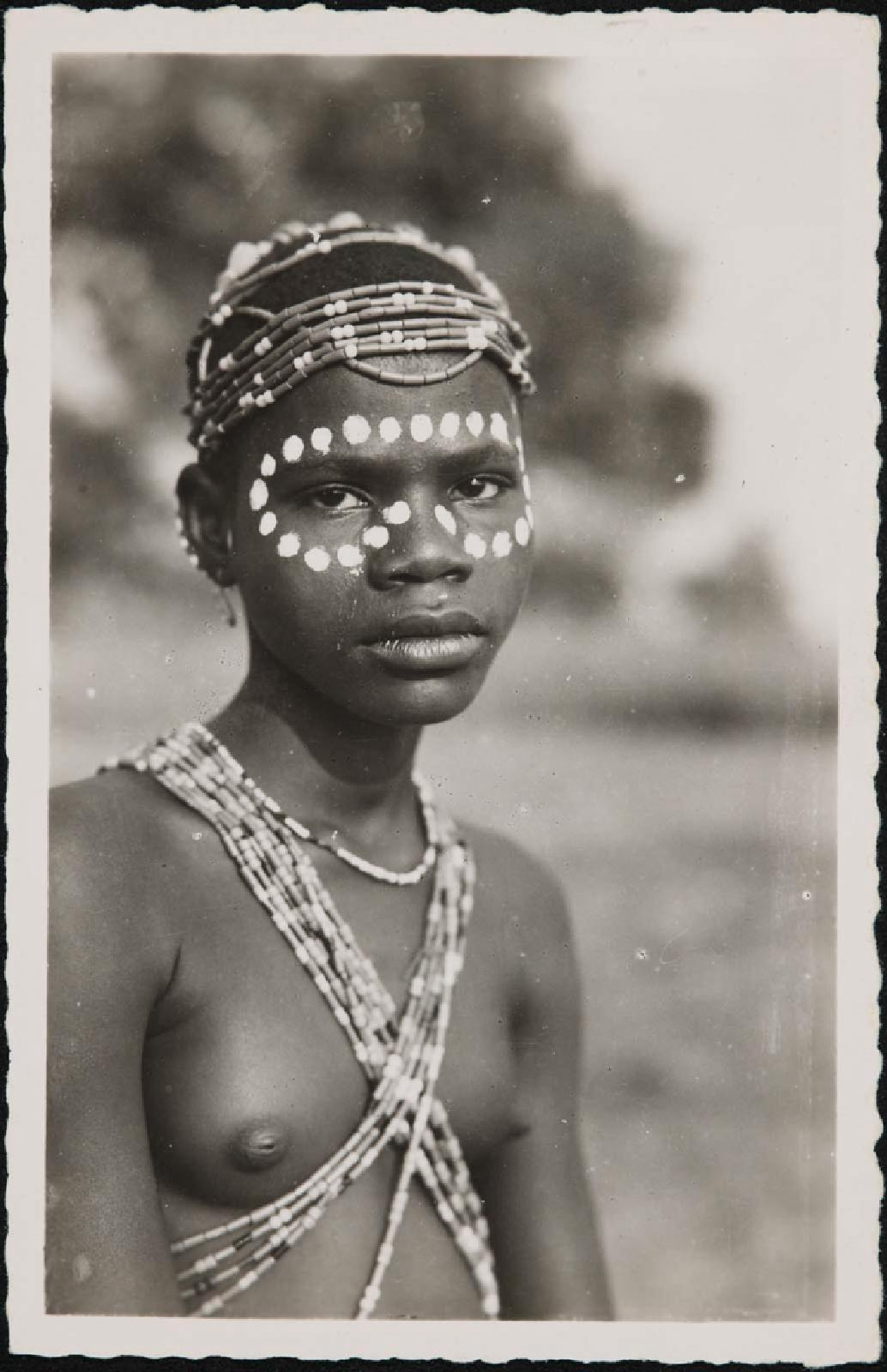 Jeune danseuse Loango et ses parures